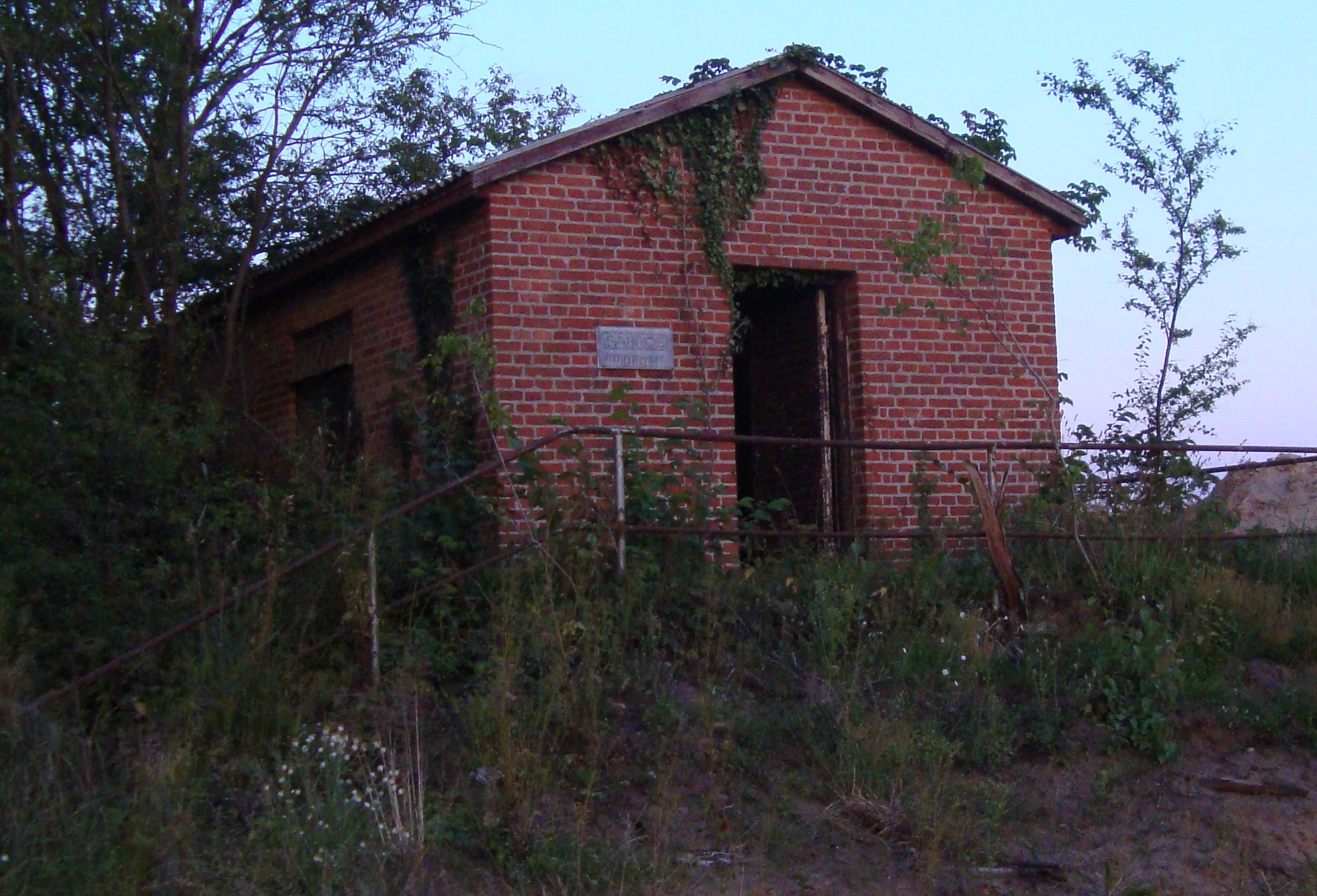 Frysehuset i Hvilshøj, Vendsyssel